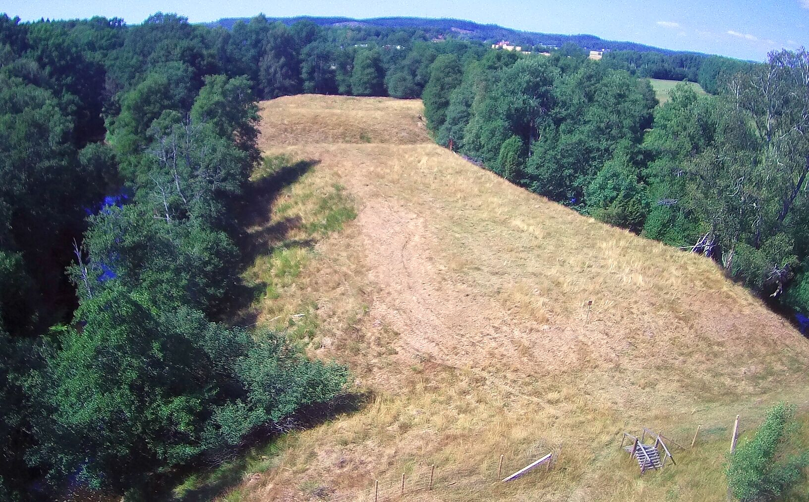 Resterna av medeltida Stynaborg vid Säveån. Närmast är ett förborgsområde, och längre bort huvudbyggnaden.